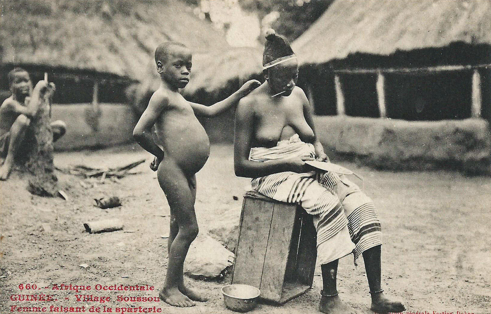 François-Edmond Fortier, Village Soussou. Femme faisant de la sparterie. Afrique Occidentale. Guinée